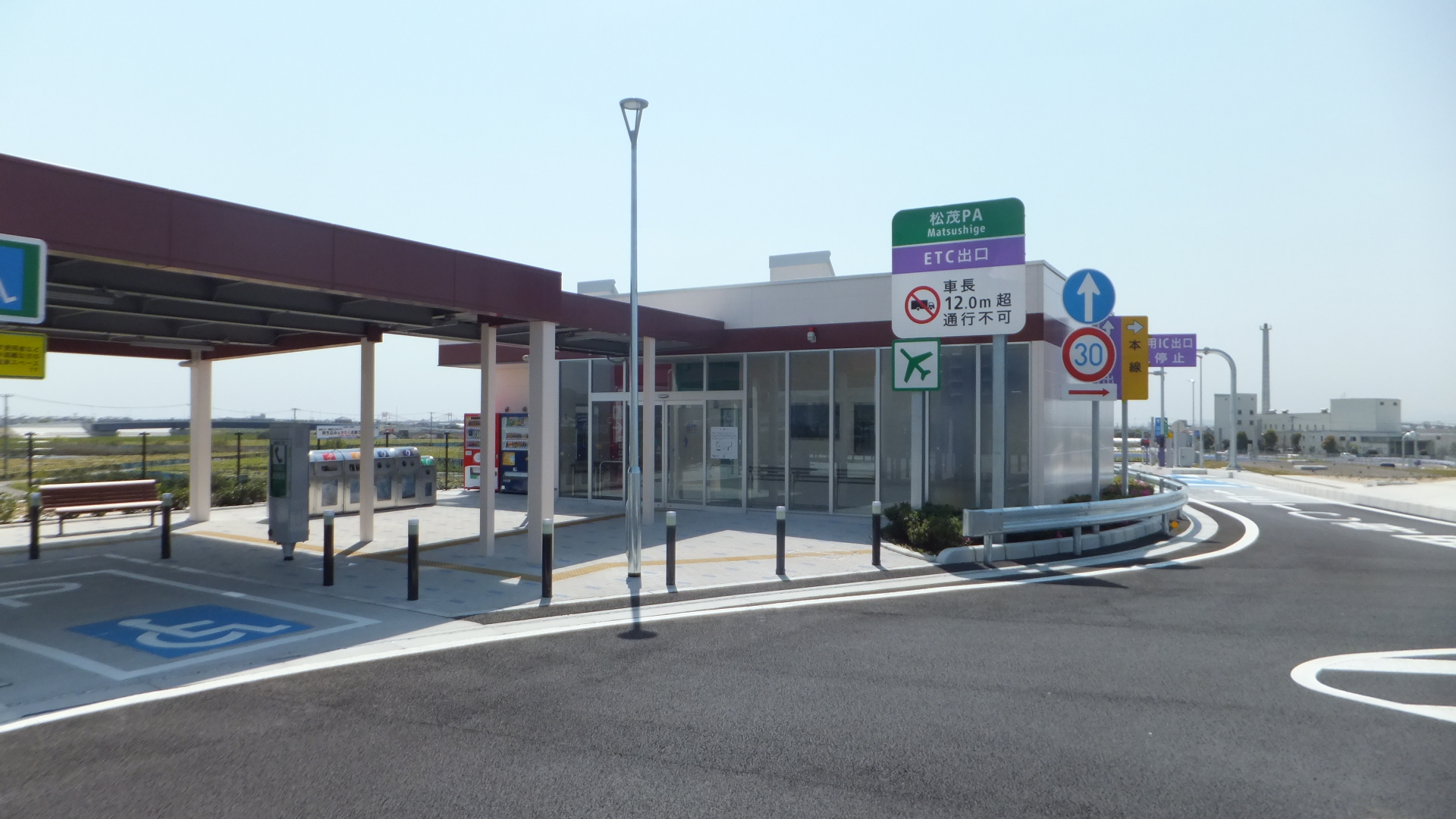 松茂パーキングエリア